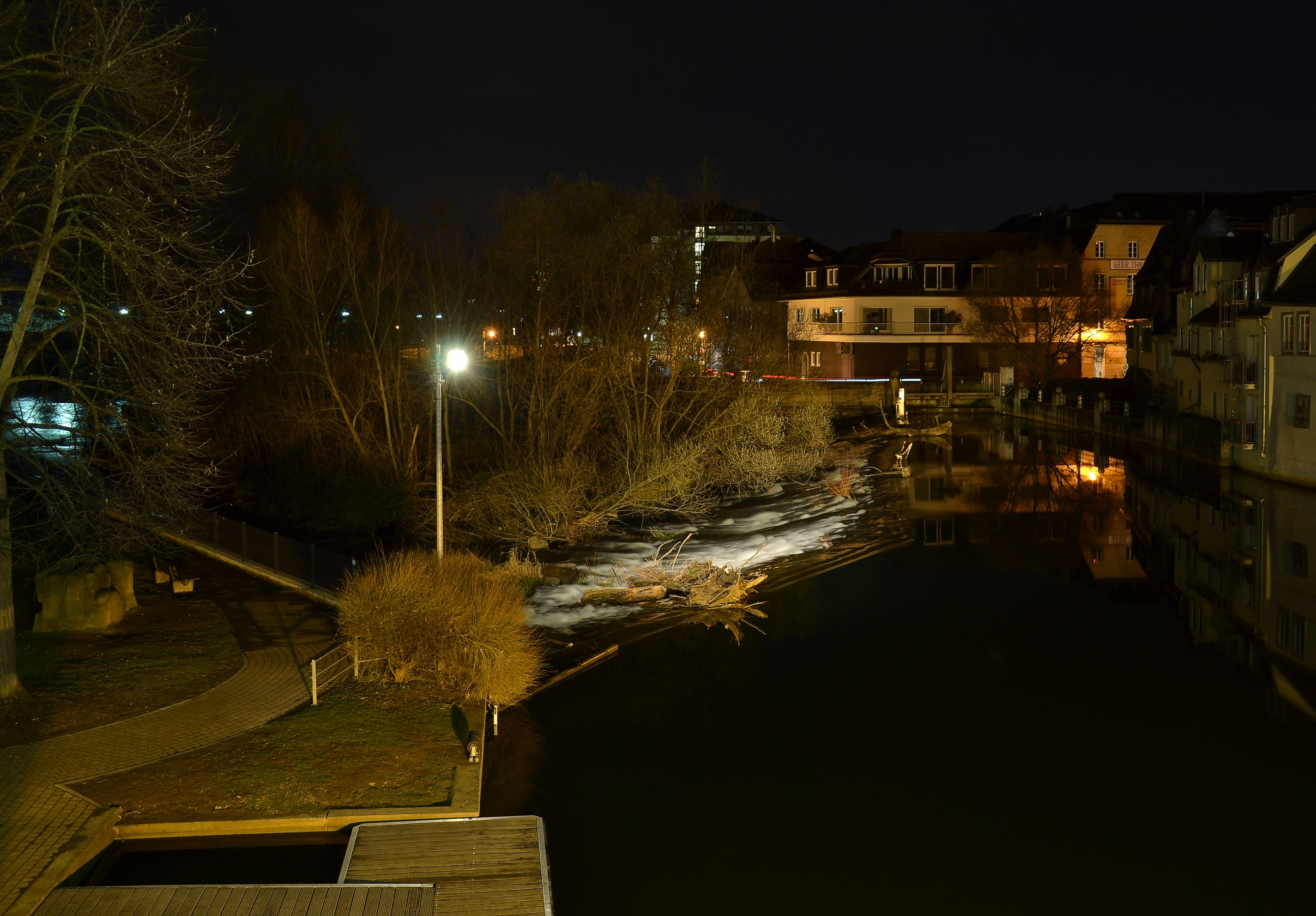 Blick von der alten Nahebrücke auf den Mühlenteich in Bad Kreuznach